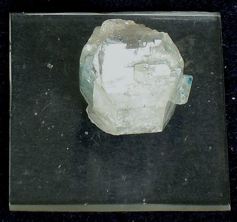 A 4 cm crytal of Euclase from Equador, Rio Grande do Norte, Brazil